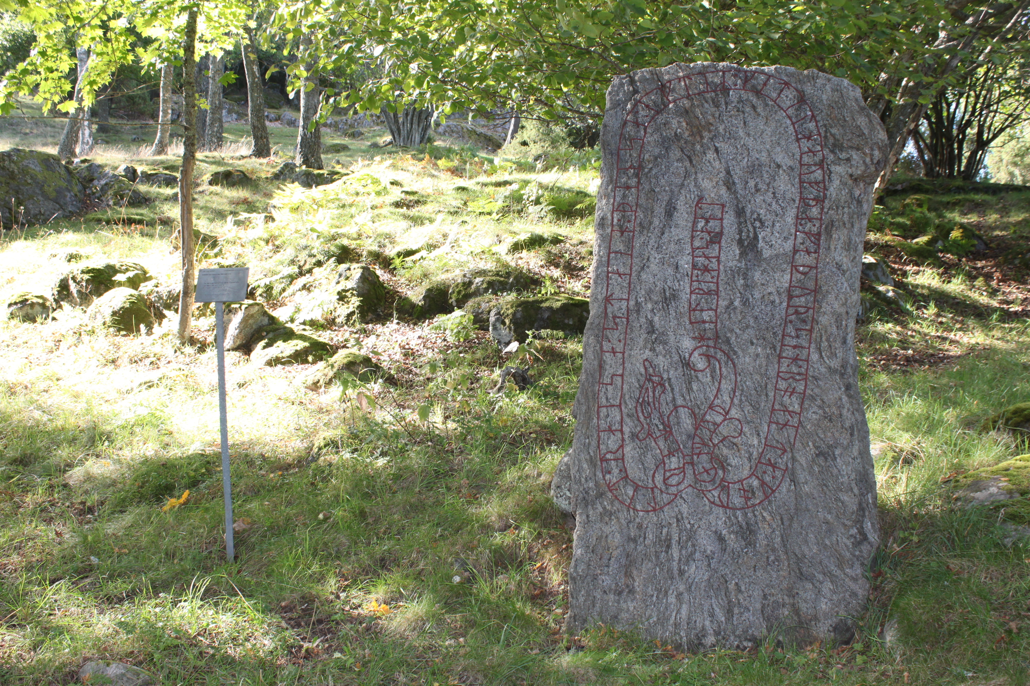 Hölö 252:2. Runristning. Bevakningsobjekt. (Sö 19). Vid detta datum är koordinaterna fel i Fornsök.